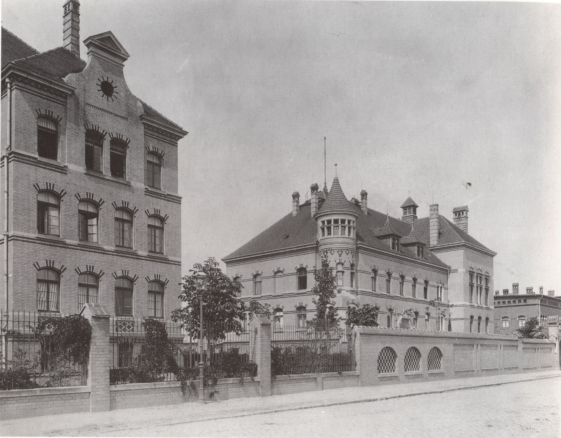 Leipzig: Die Prinz-Johann-Georg-Kaserne des 8. Infanterie-Regimentes Nr. 107 in der Heerstraße (heutige Olbrichtstraße).